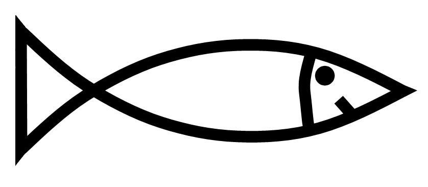 Divisionsabzeichen der 35. Infanterie-Division der Wehrmacht